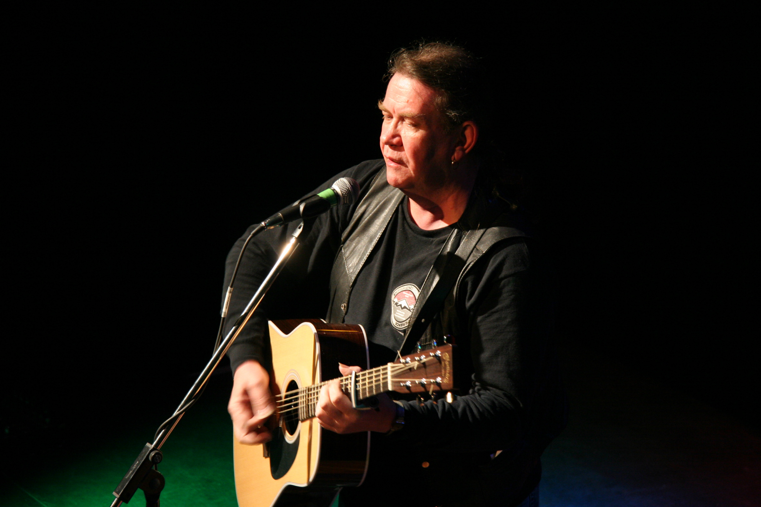 Dick Gaughan at the "Rätsche" in Geislingen/Steige, Germany